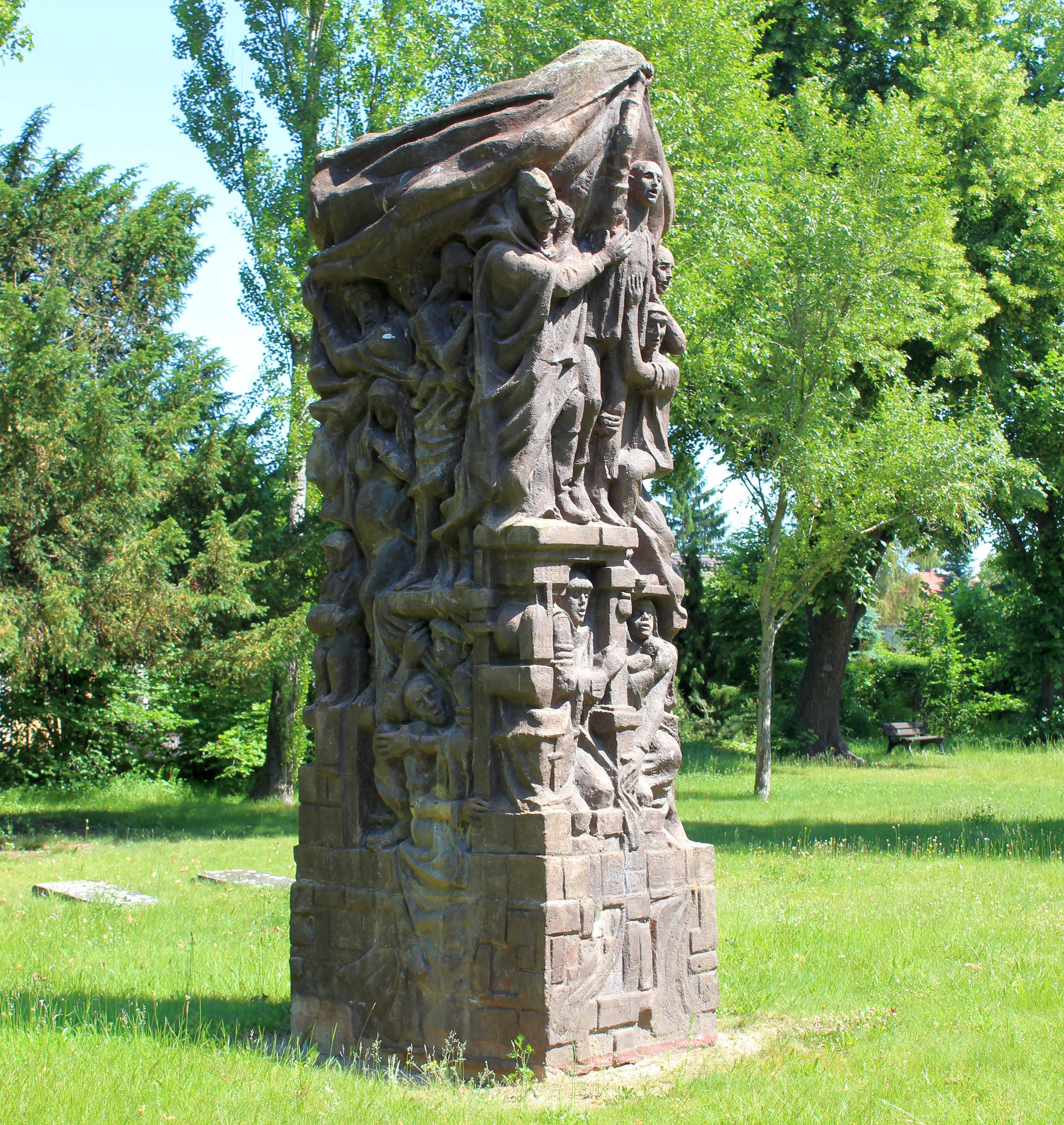 Skulptur von Hans Eickworth im Stadtpark der Kleinstadt Elsterwerda.